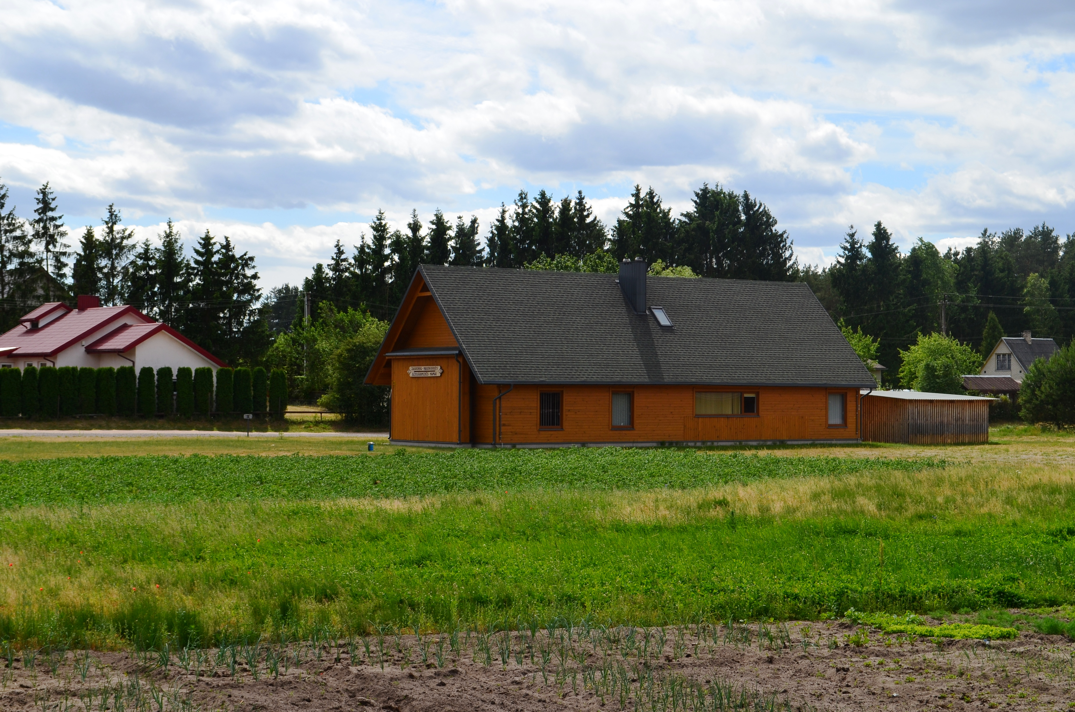 Jaskonys, kaimo bendruomenės namai, Druskininkų sav.